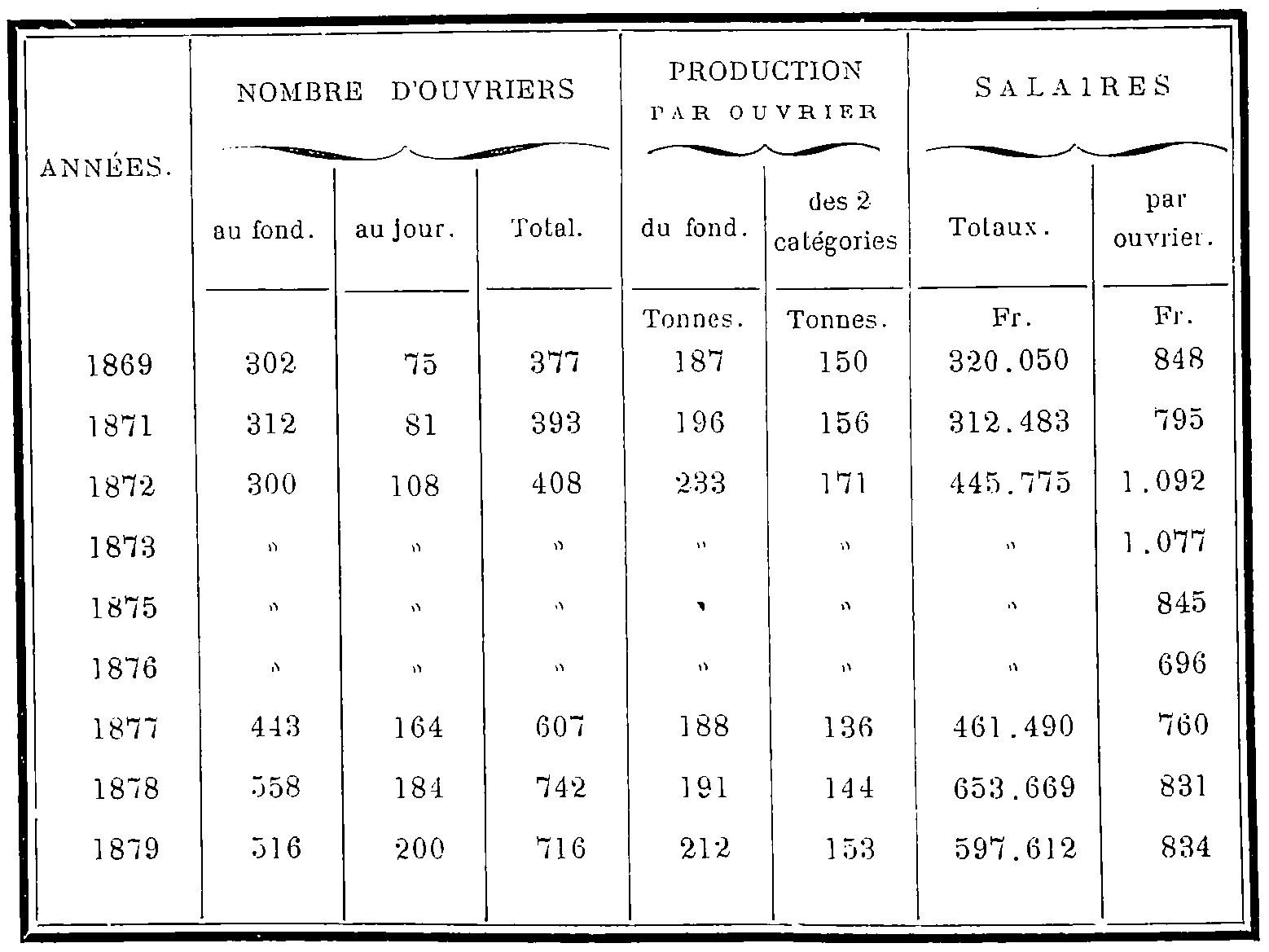 Ouvriers, rendement et salaires de la Compagnie des mines de Meurchin entre 1869 et 1879.